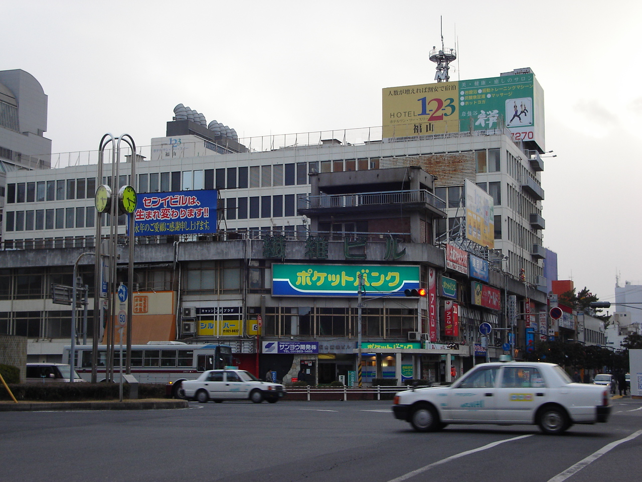 fukuyama seni bldg.